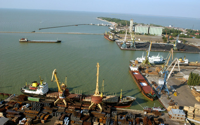 Ейский морской порт с воздуха